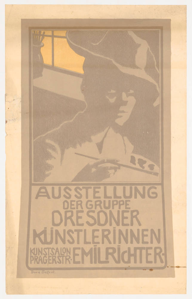 Ausstellungsplakat von Dora Richter der Gruppe Dresdner Künstlerinnen. Das Plakat entstand vor 1910. Im Kunstsalon Emil Richter fanden drei Ausstellungen der Gruppe der Dresdner Künstlerinnen statt: 1904, 1906 und 1909.